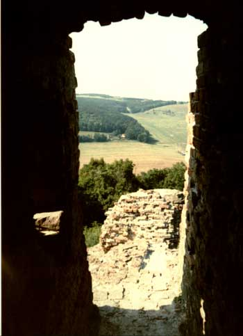 Kereki várrom